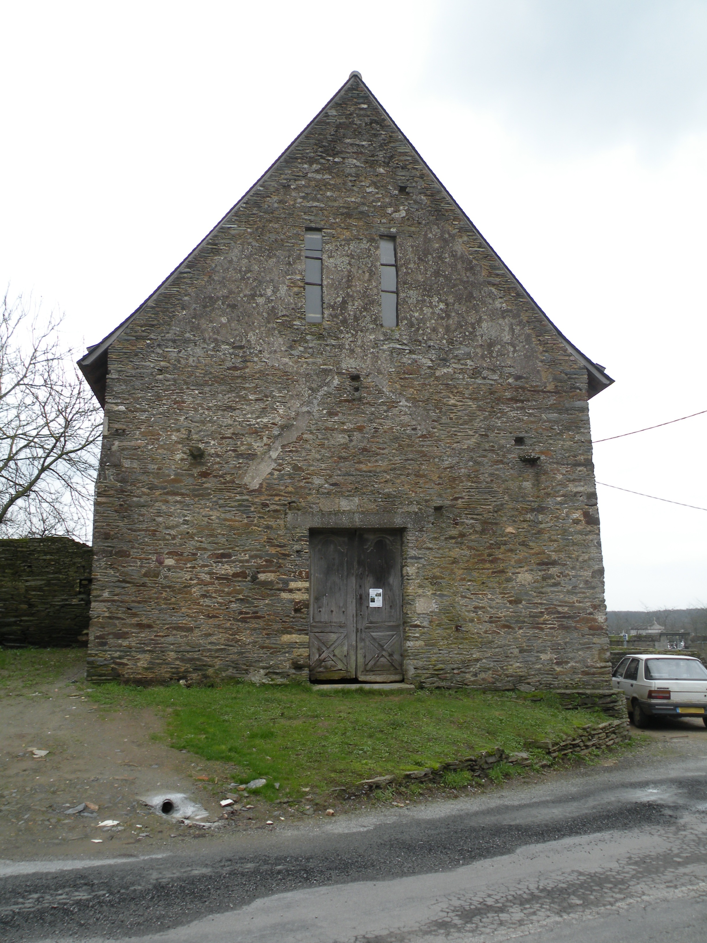 Entrée de l’ancienne église Saint-Saturnin-du-Vieux-Bourg à Nozay.